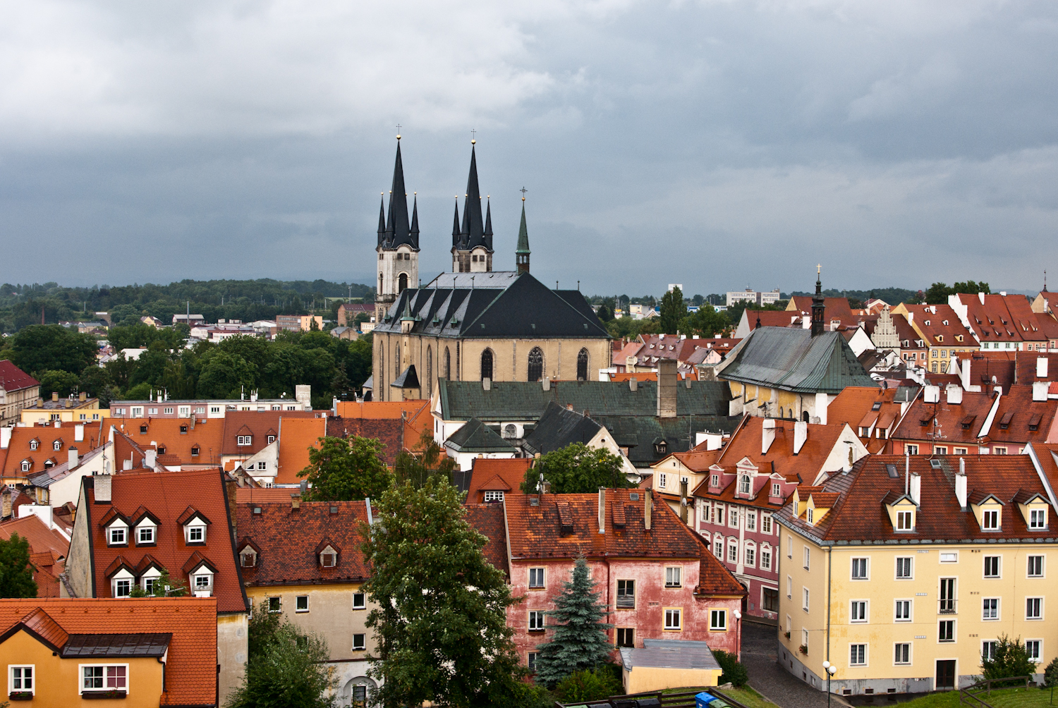 Cheb kostel sv.Mikuláše